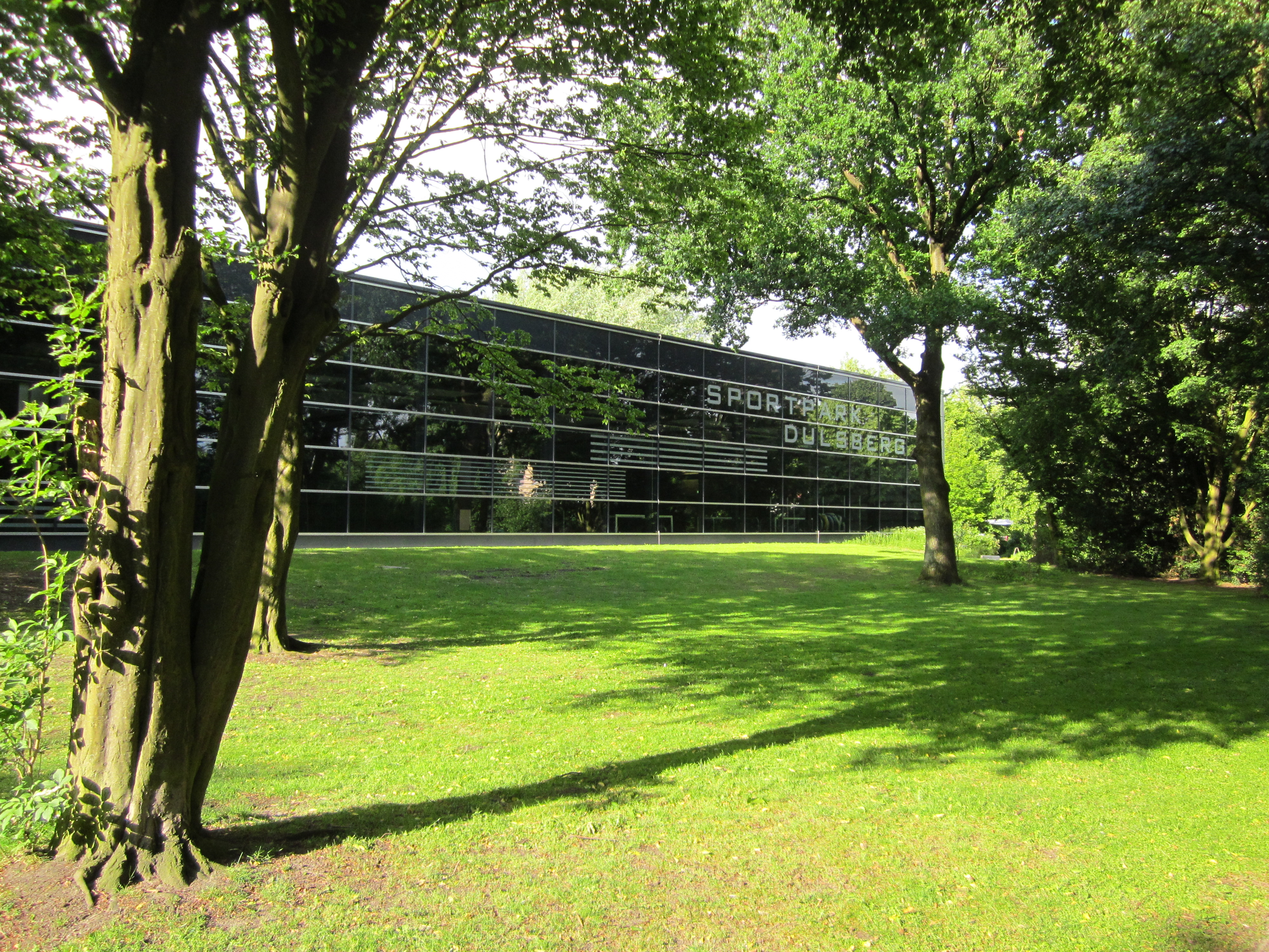 Das Dulsberger Hallenbad dient seit vielen Jahren als Sitz des Olympiastützpunktes Hamburg/Schleswig-Holstein und Bundesstützpunkt für den Schwimmsport.